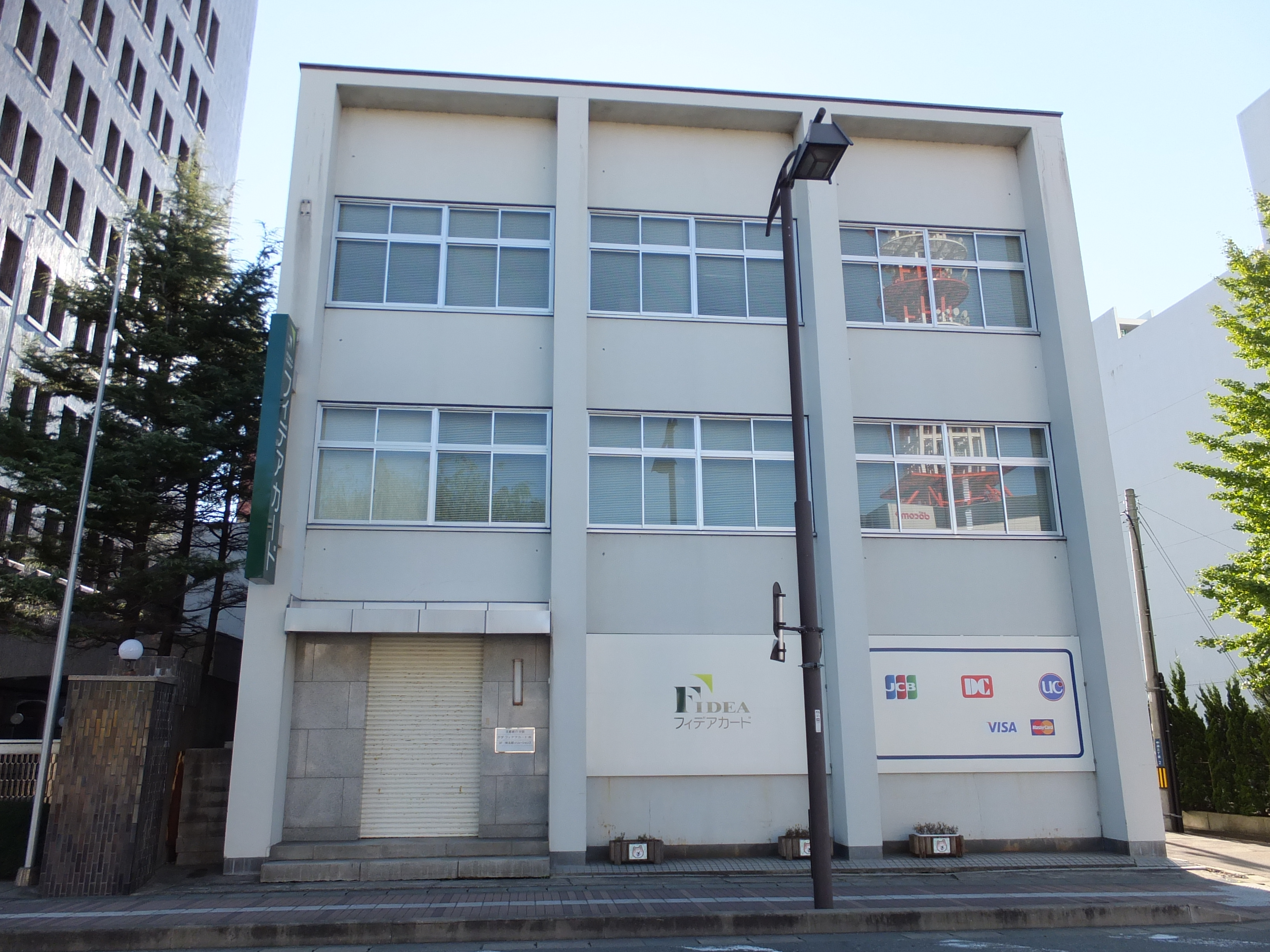 北都銀行別館（秋田市中通）